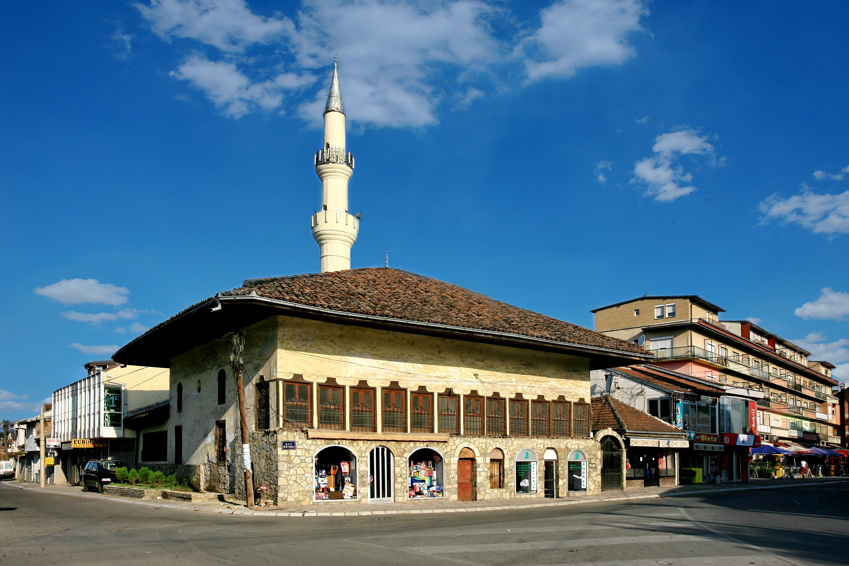 Xhamia e Haxhi Ymerit